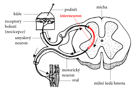 Zapojení interneuronu v rámci reflexní odpovědi na bolestivý podnět.